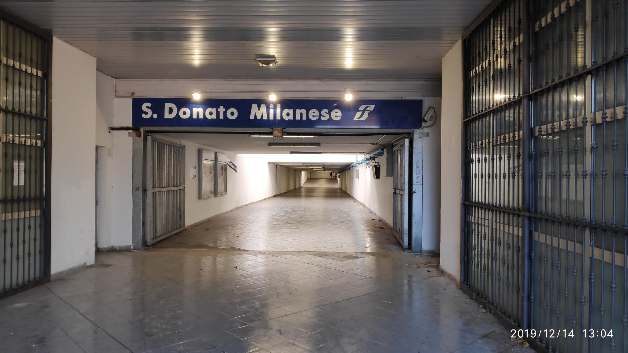 Sottopassaggio ferroviario di San Donato Milanese (Dicembre 2019)